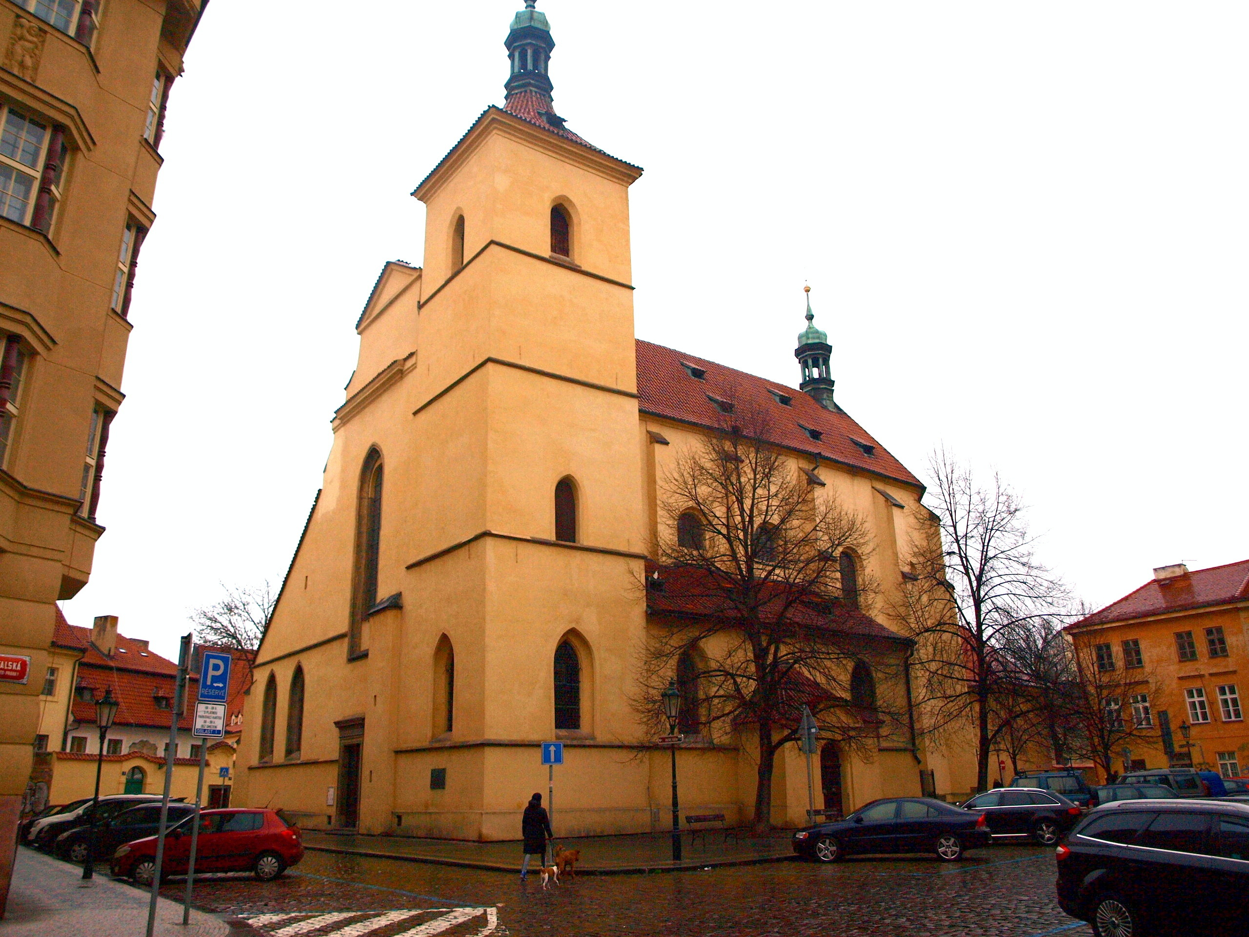 Praha, kostel sv. Haštala